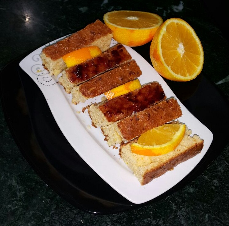 حلقات من كيك البرتقال (كعكة البرتقال) مع شرائح البرتقال الطازج